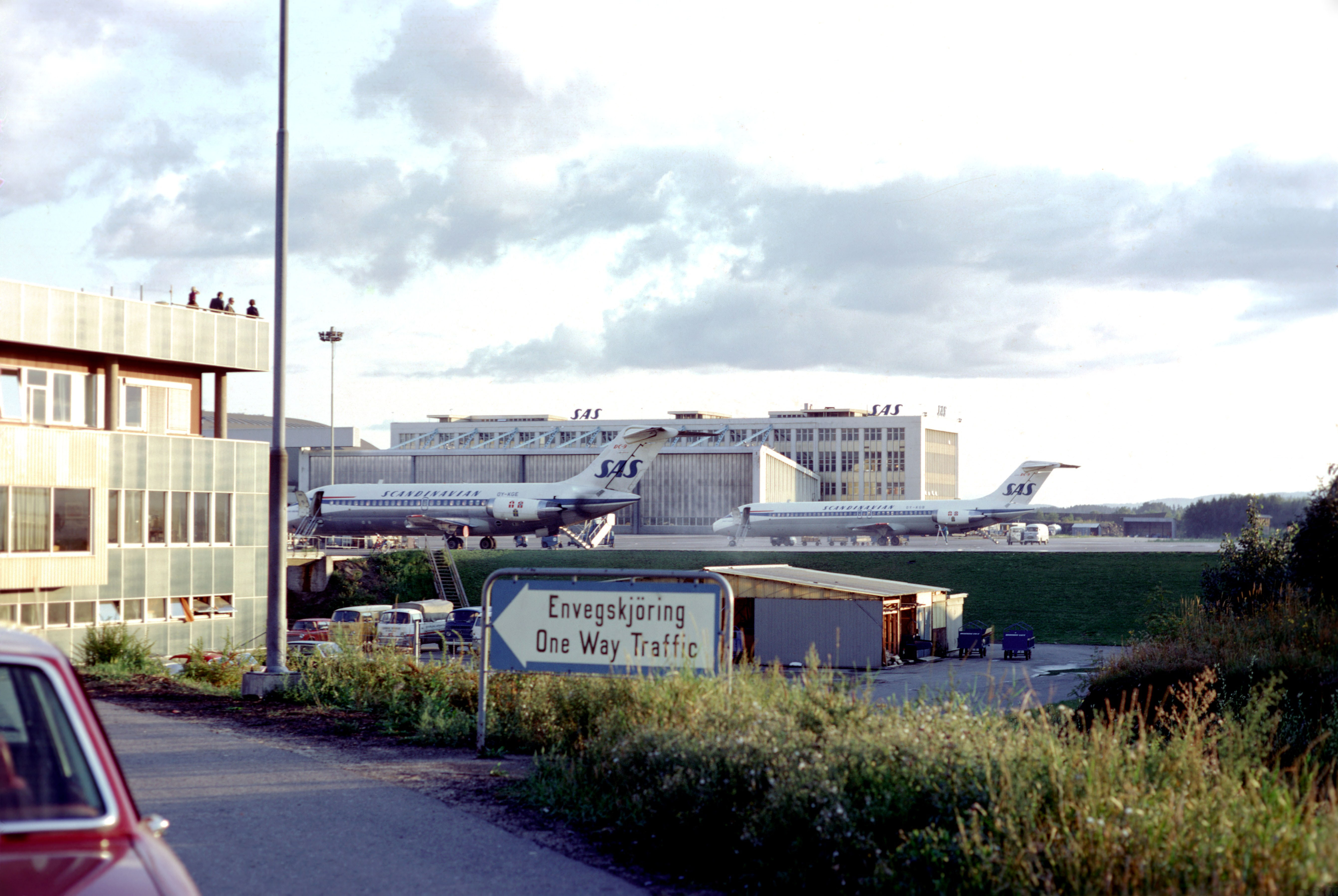 La voie d’accès à l’aéroport, le tarmac avec deux avions DC-9 de la SAS et les hangars de la SAS. Août 1972. Bærum (Fornebu), Norvège.